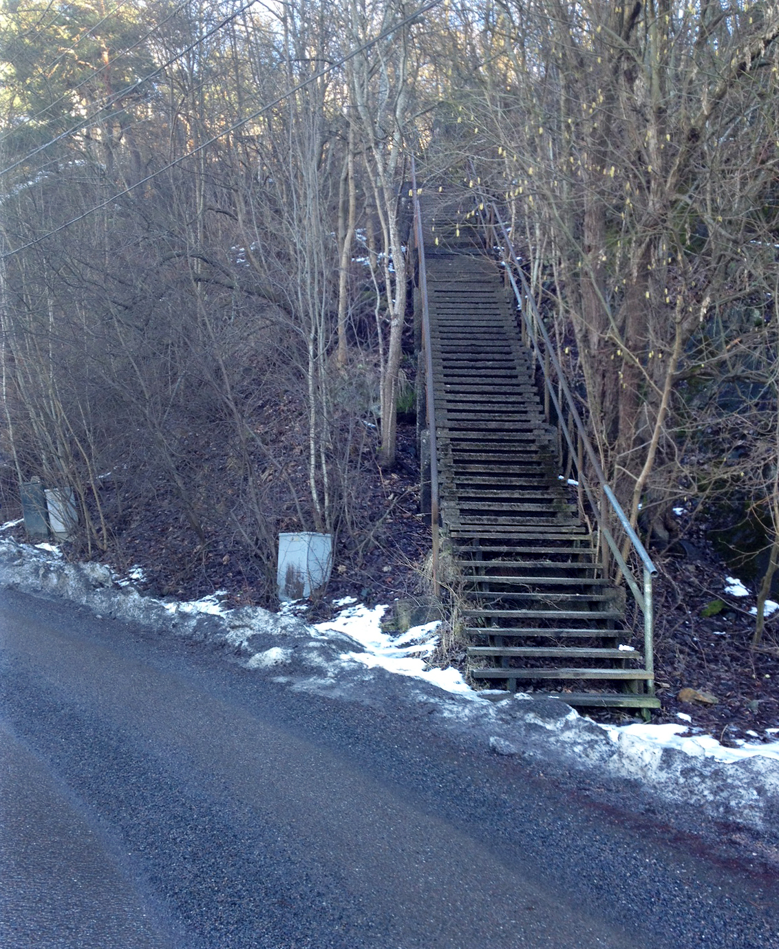 Selve trappa opp fra veien Fagerlia i Oslo, opp til nedre ende av veistubben som har fått navnet Fagerlitrappa